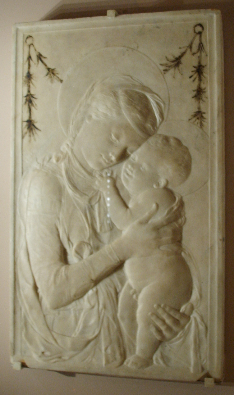 Desiderio da Settignano, Madonna col bambino di Torino, Galleria sabauda, 1450 circa